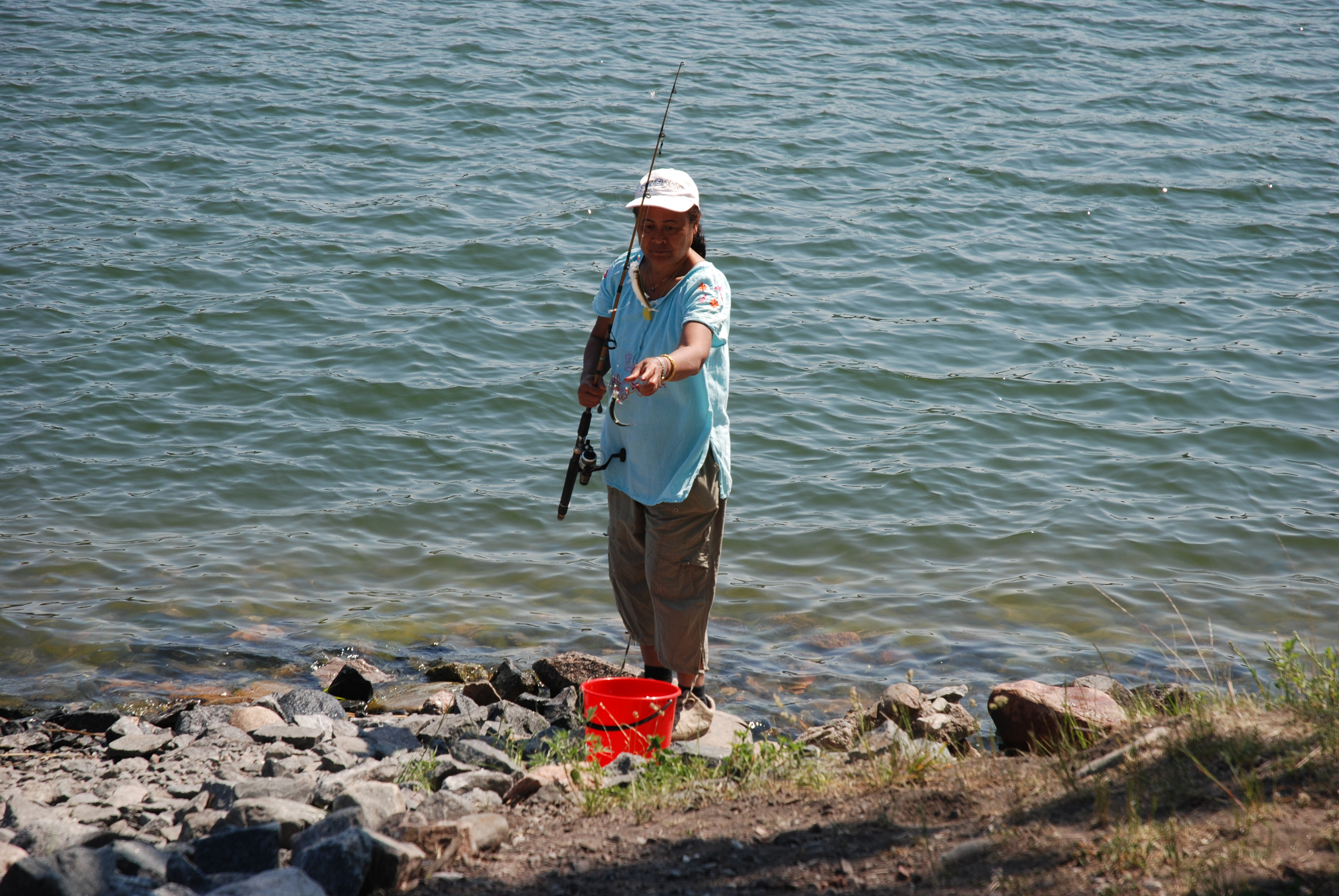 Strömmingsfiske med metspö och flera krokar i Östersjön. Vettershaga, Roslagen